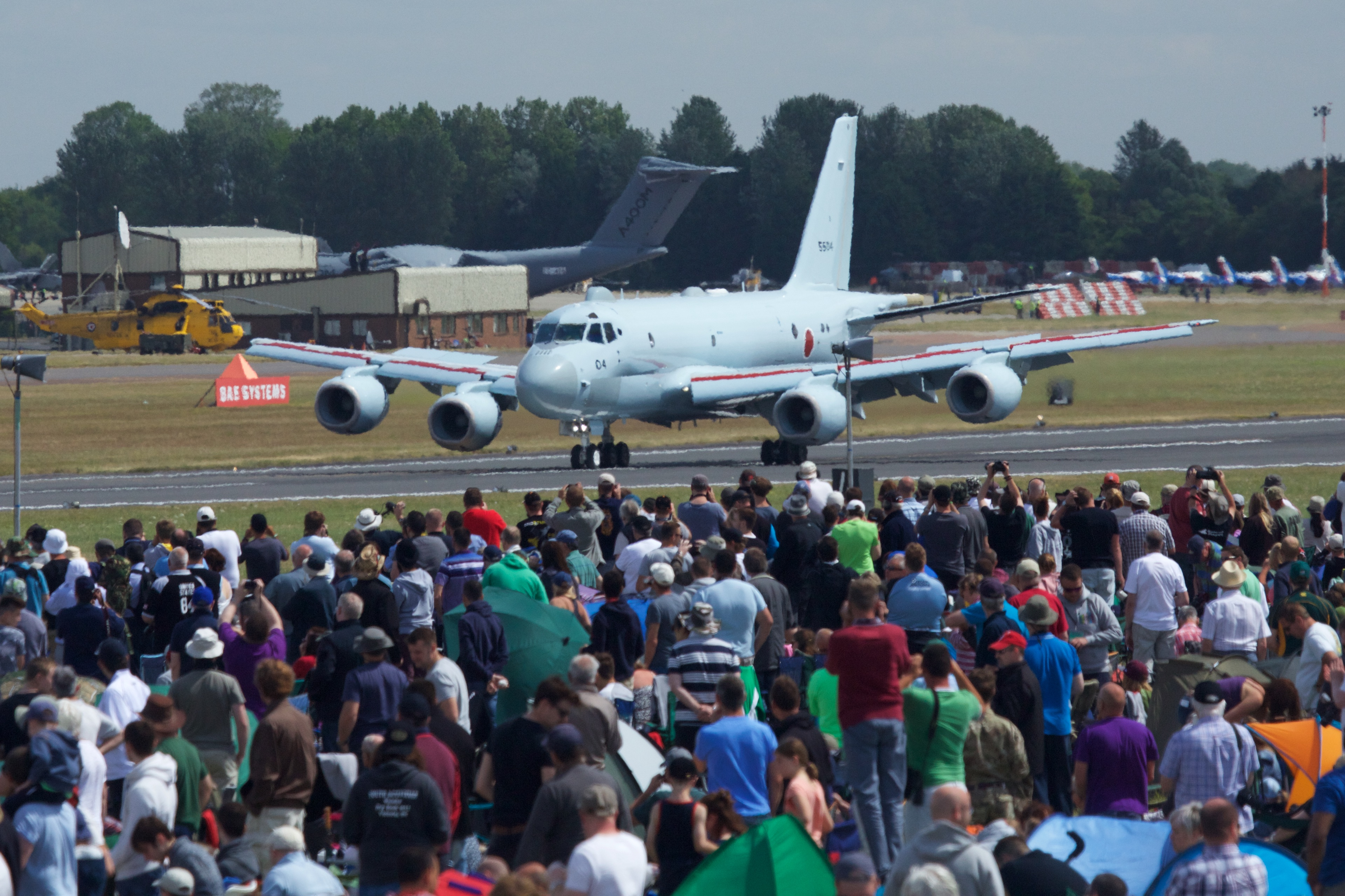 Kawasaki P-1